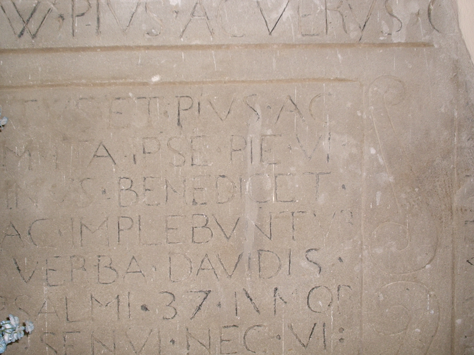 Piaskowa płyta nagrobna Matiasza III Bala zmarłego w roku 1567 z kościoła p.w. św. Anny, foto Marek Silarski